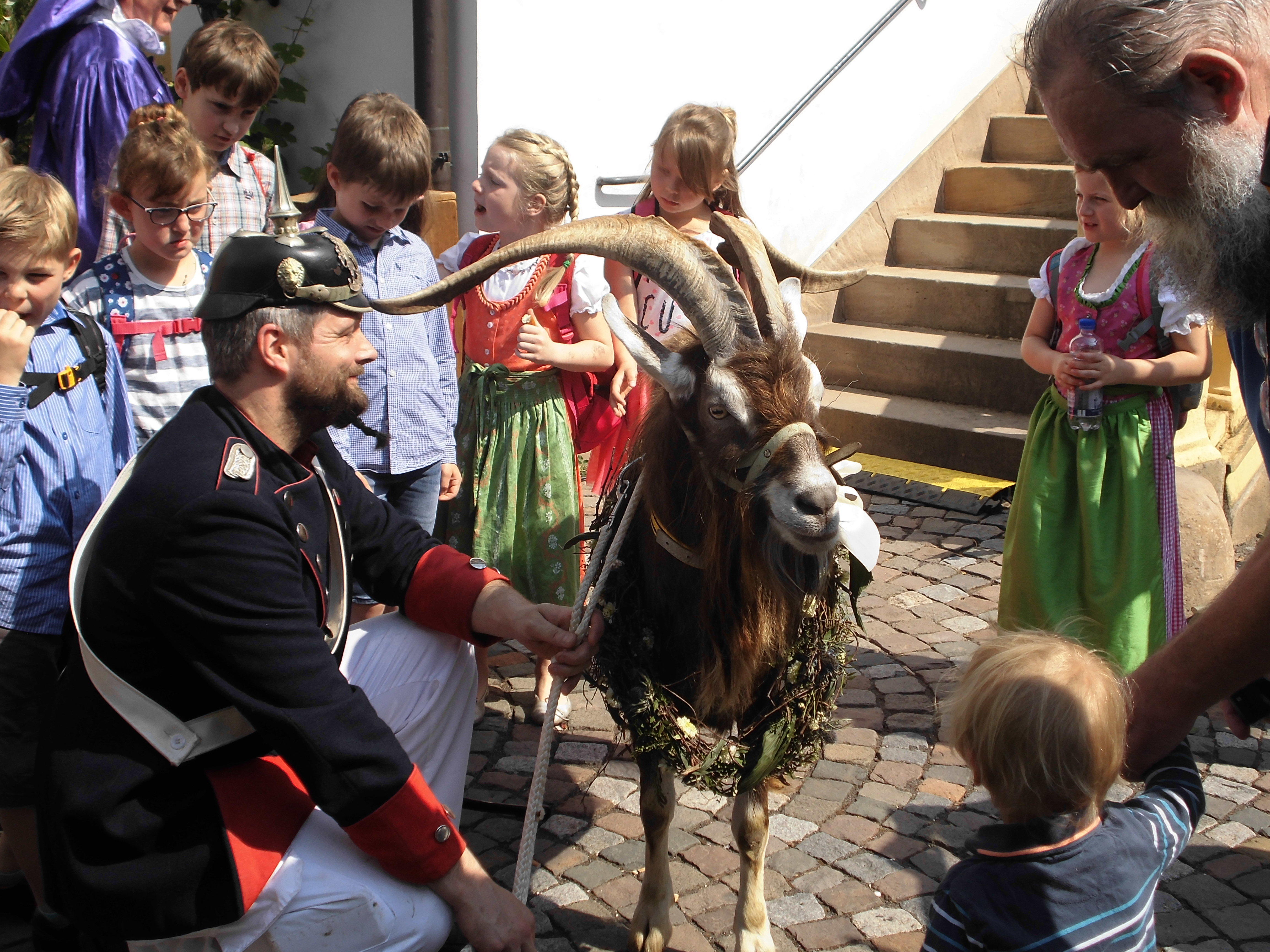 Der "Stadtbüttel" von Lambrecht präsentiert den Tributbock